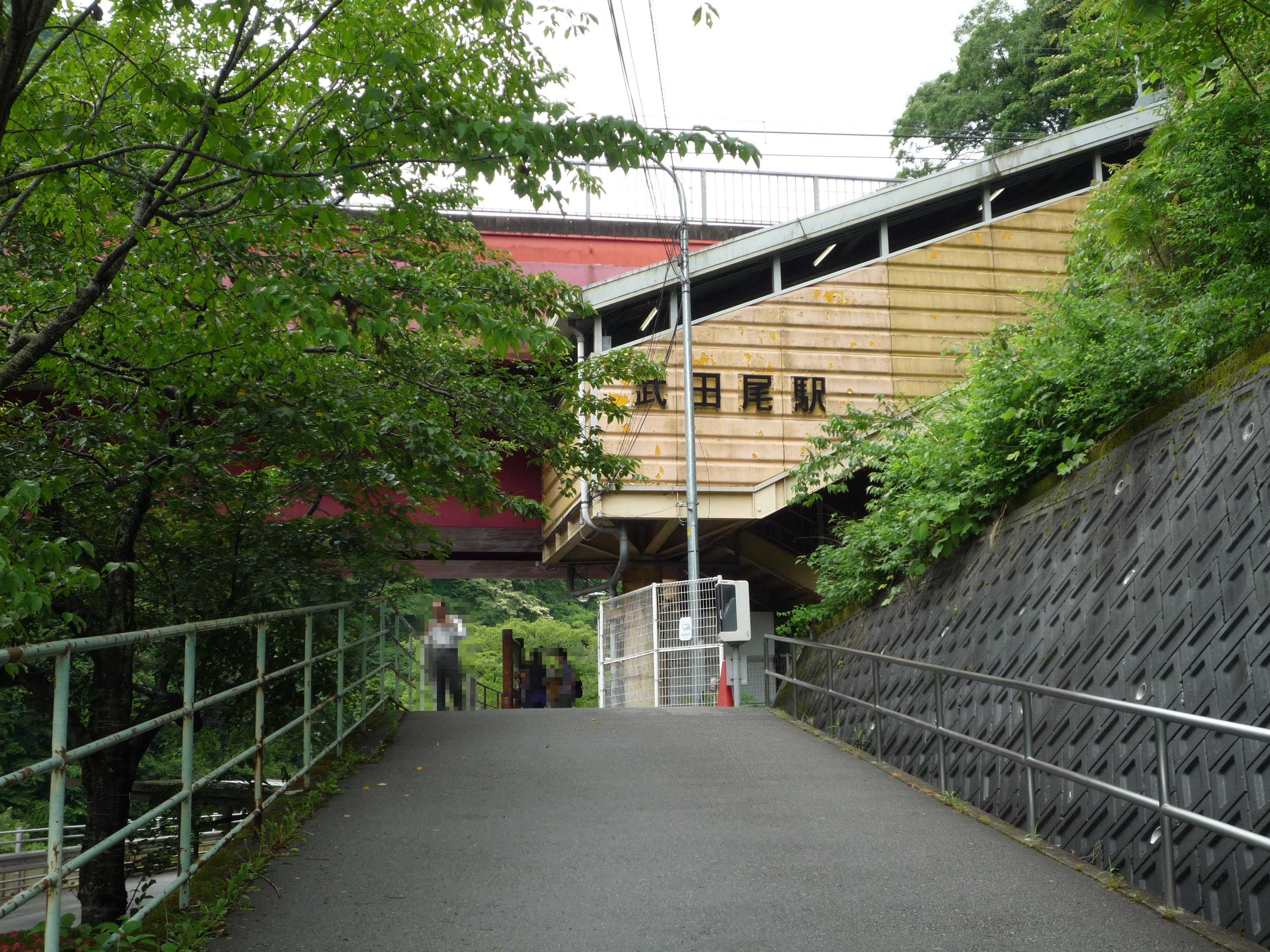 兵庫県宝塚市 JR西日本武田尾駅